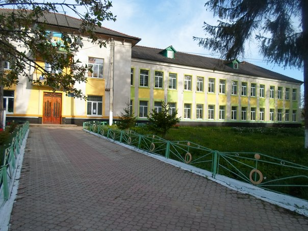 школа